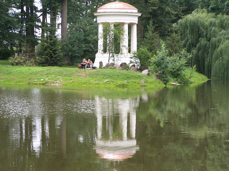 Dobrzyca, ul. Pleszewska 5A - zespół pałacowy: monopter z końca XVIII w. na sztucznej wyspie w parku pałacowym (zabytek nr 4/A)